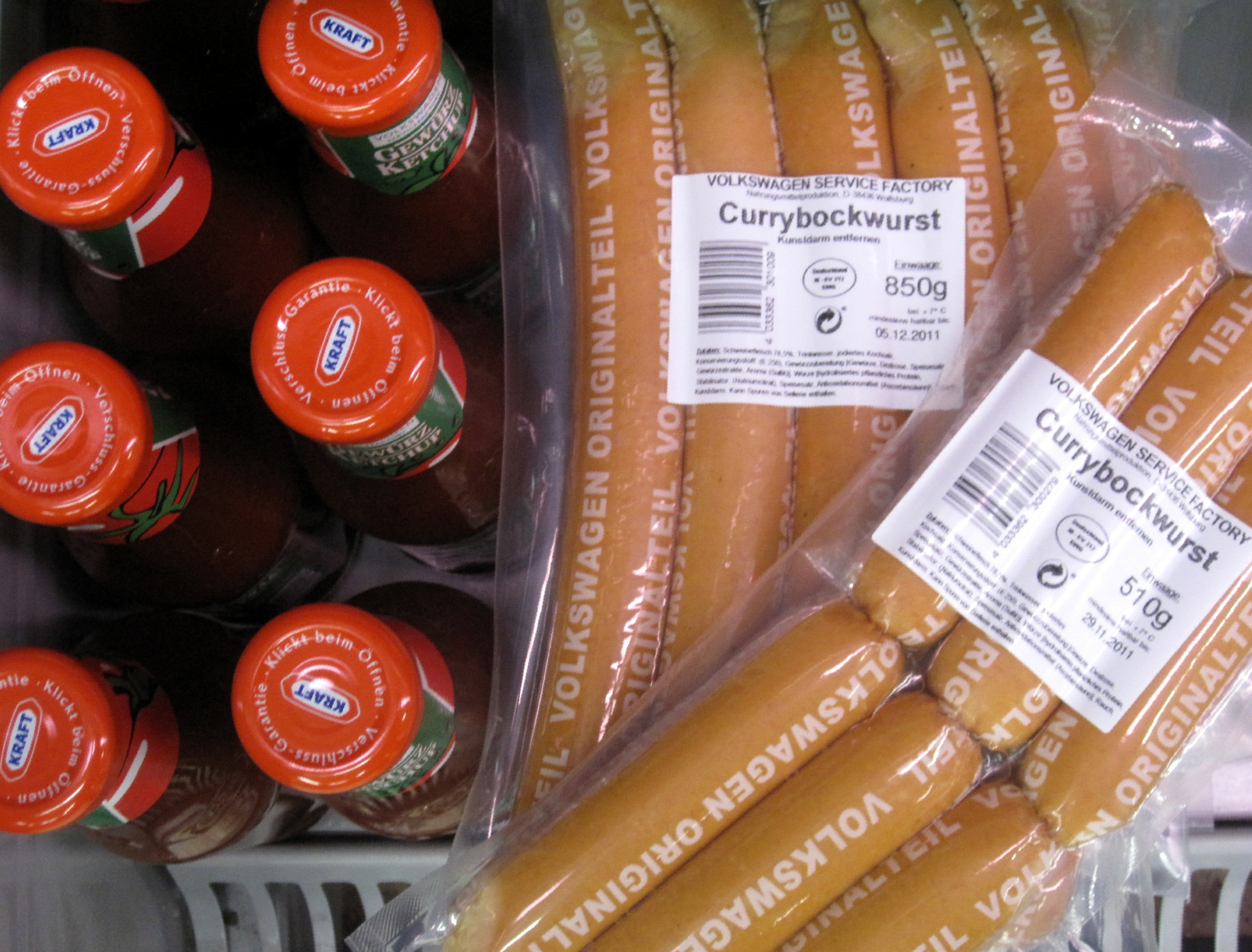 In Flaschen abgefülltes VW-Gewürzketchup sowie in Fertigpackungen eingeschweißte VW-Currywürste in zwei Größen (5 Stück à 170 Gramm bzw. 6 Stück à 85 Gramm) im Warenregal eines Görge-Edeka-Supermarktes in Braunschweig